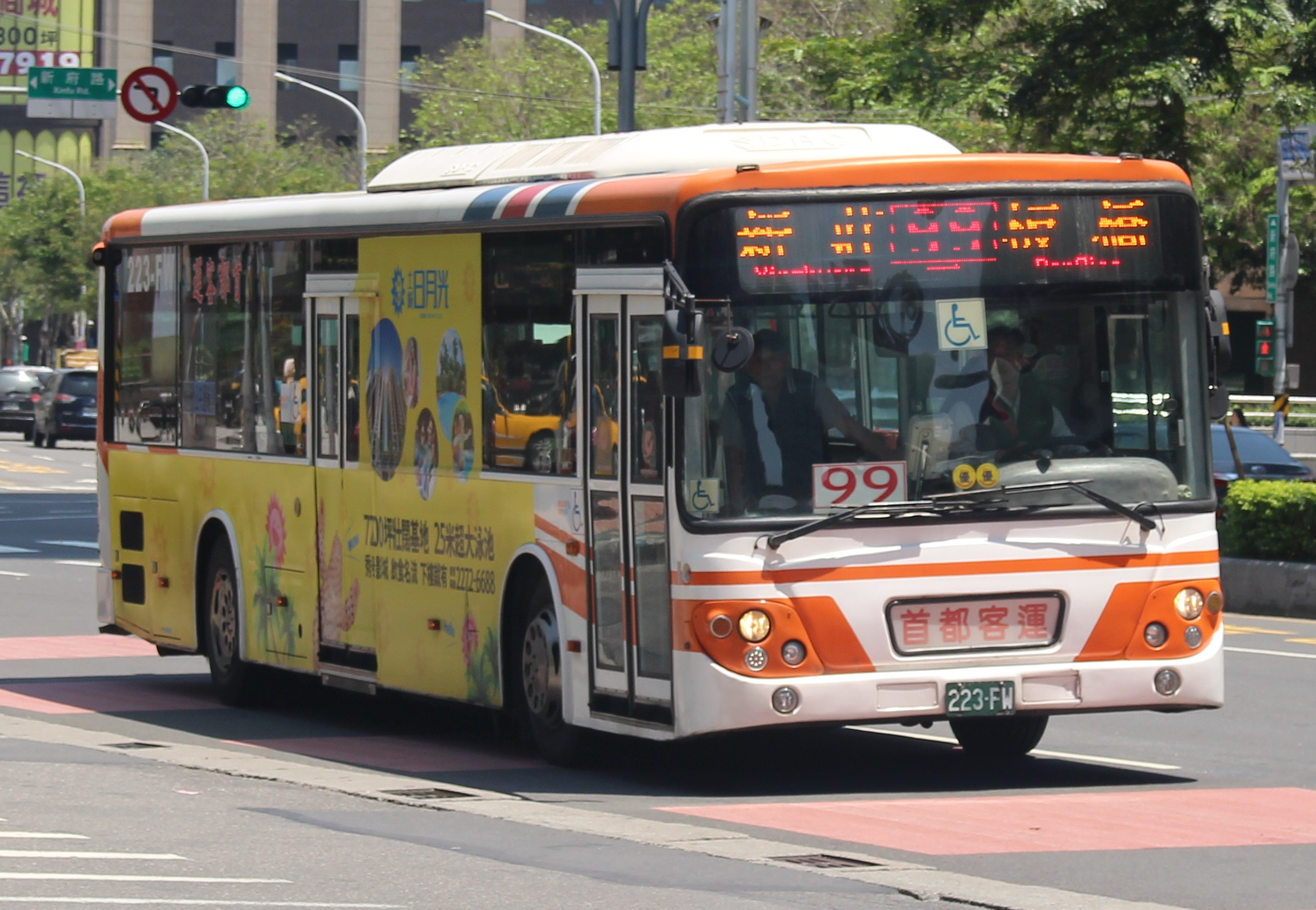 首都客運2011 DAEWOO BS120CN 223-FW 99